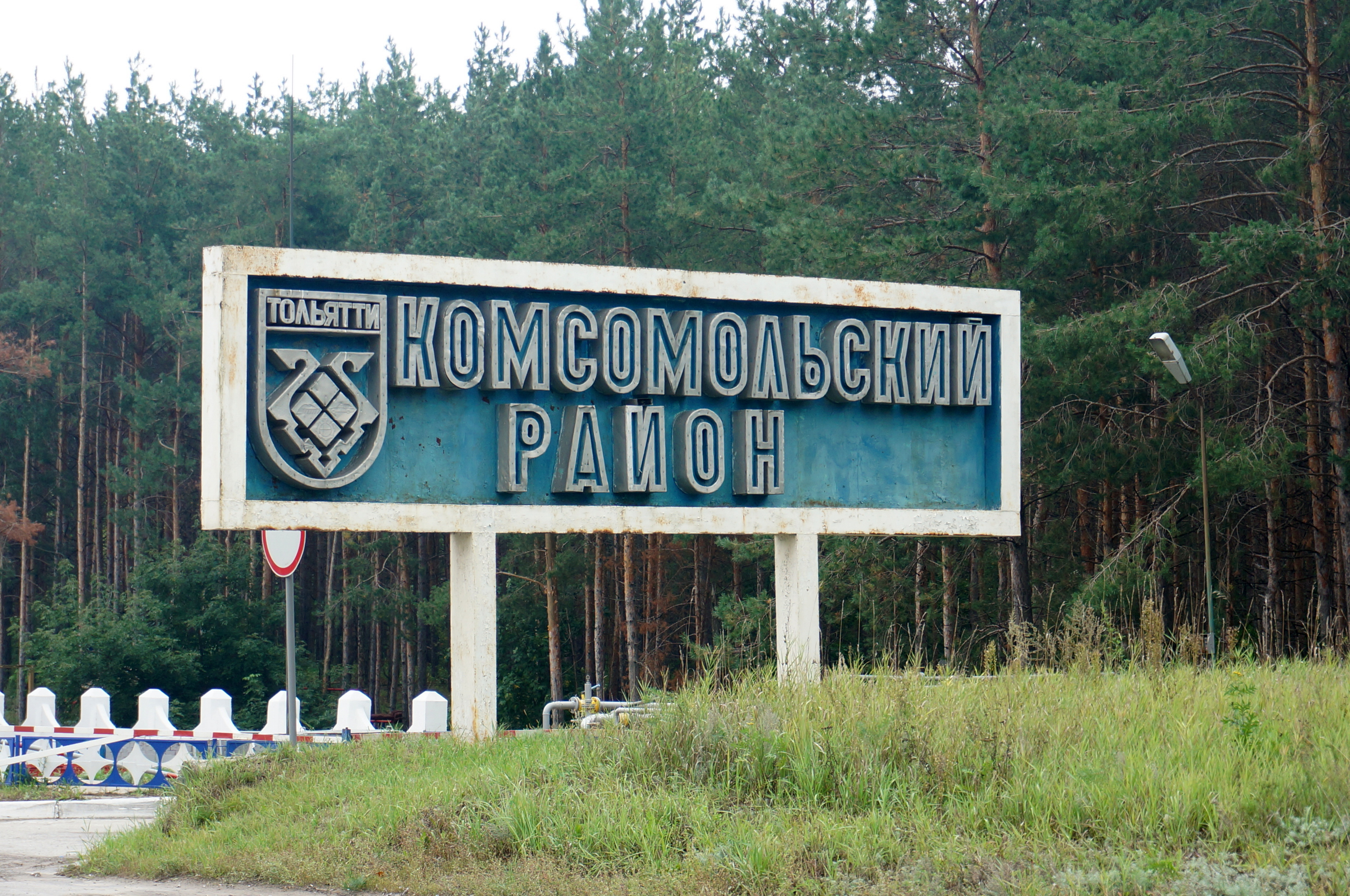 Приветственный знак на въезде в Комсомольский район Тольятти